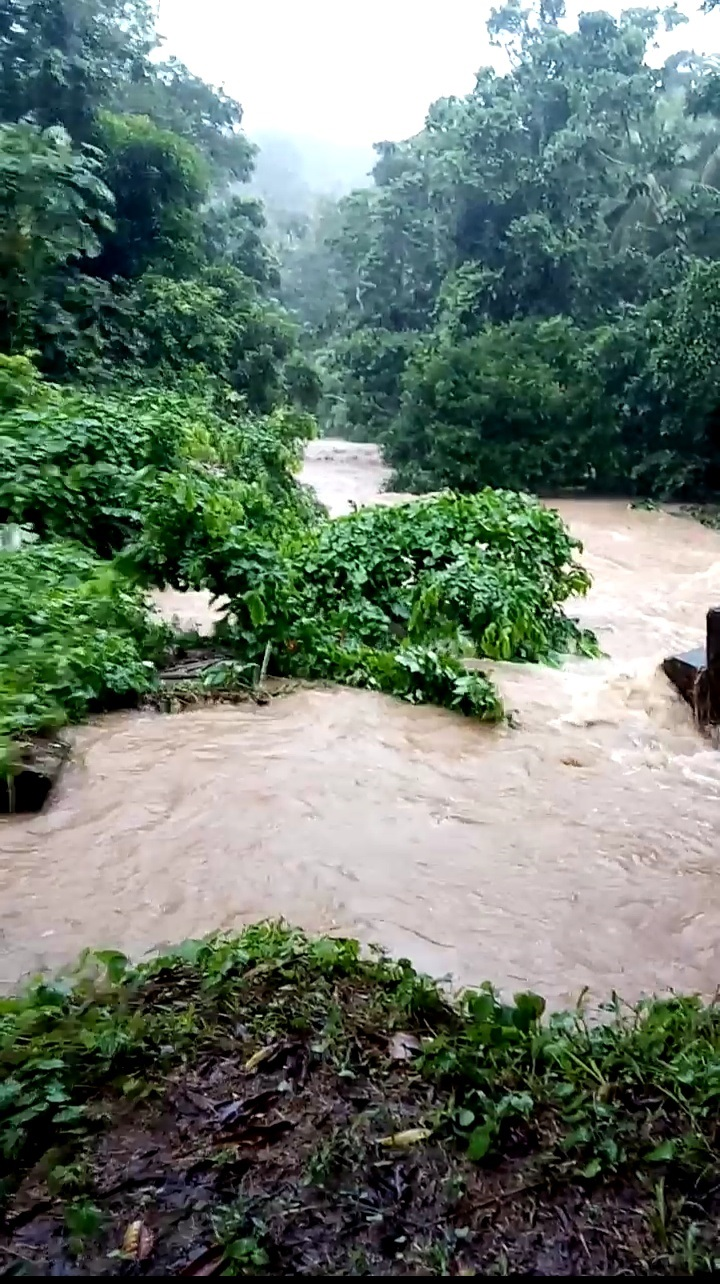 Río Pitahaya en Sector Casa Blanca en Barrio Pitahaya en Luquillo, Puerto Rico despues del Huracán Isaias en Julio 2020